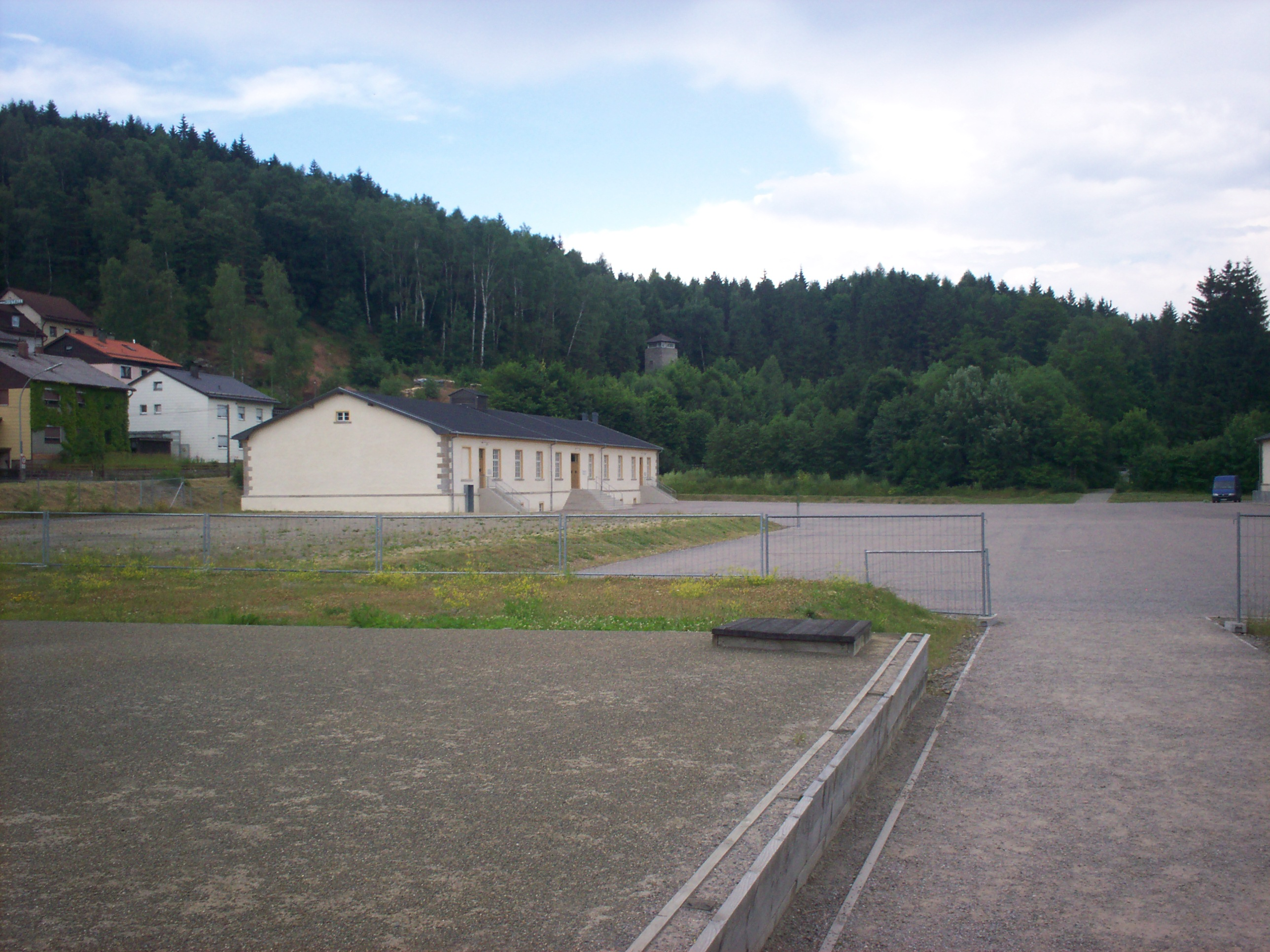 Appellplatz im KZ Flossenbürg, 2008